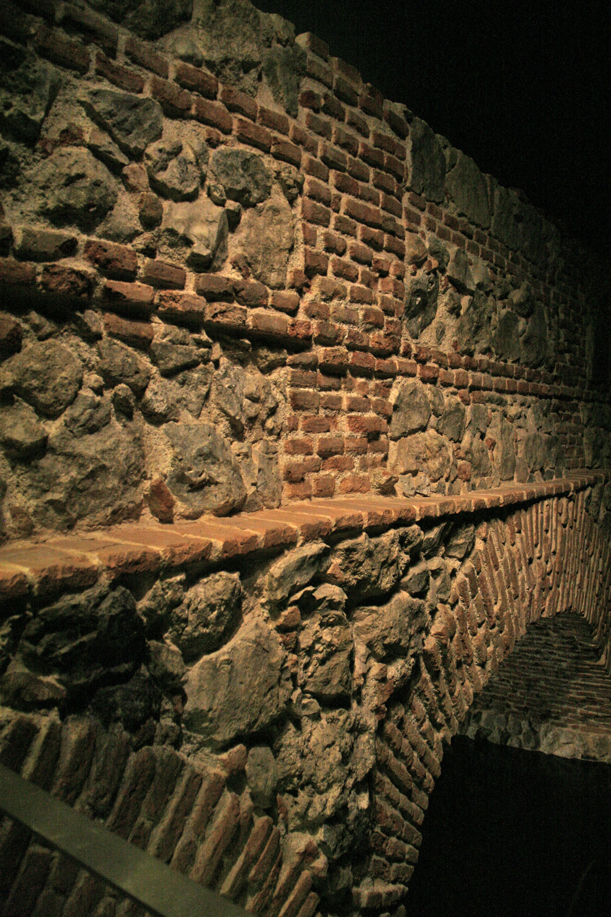 Viaje de Amaniel - Plaza de Isabel II (Madrid)